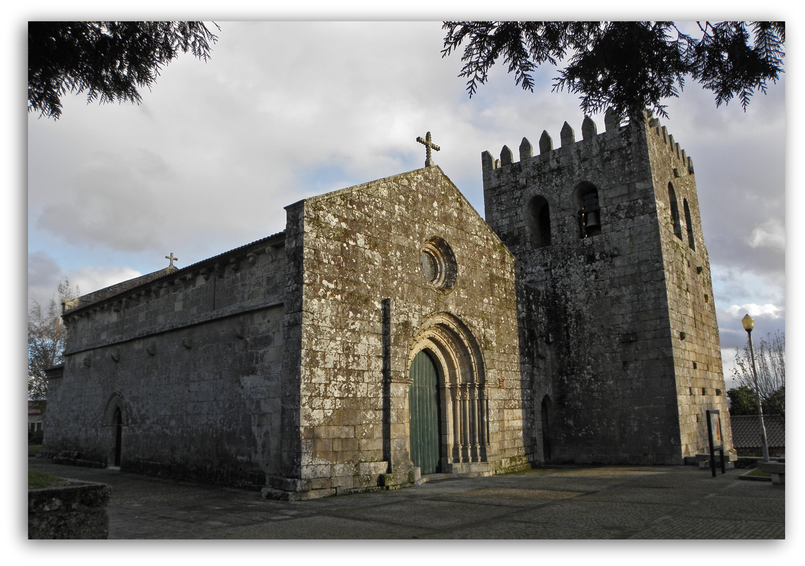 Igreja de Santa Maria de Abade de Neiva